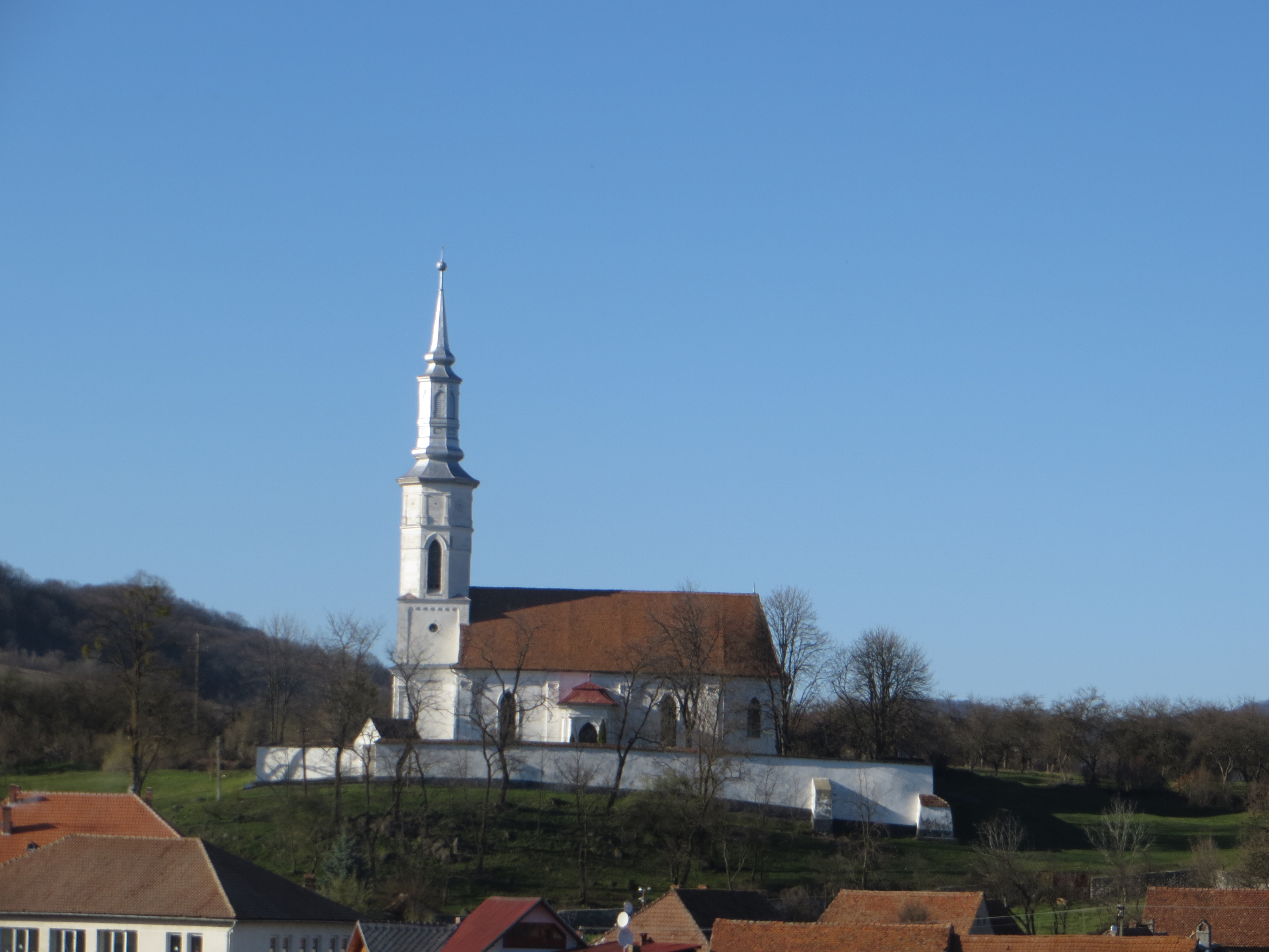 Ansamblul bisericii reformate